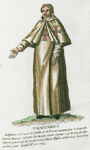 Collection de costumes de tous les ordres monastiques, supprimés à differentes époques, dans la ci-devant Belgique, Bruxelles, Philippe Joseph Maillart et sœur, 1811